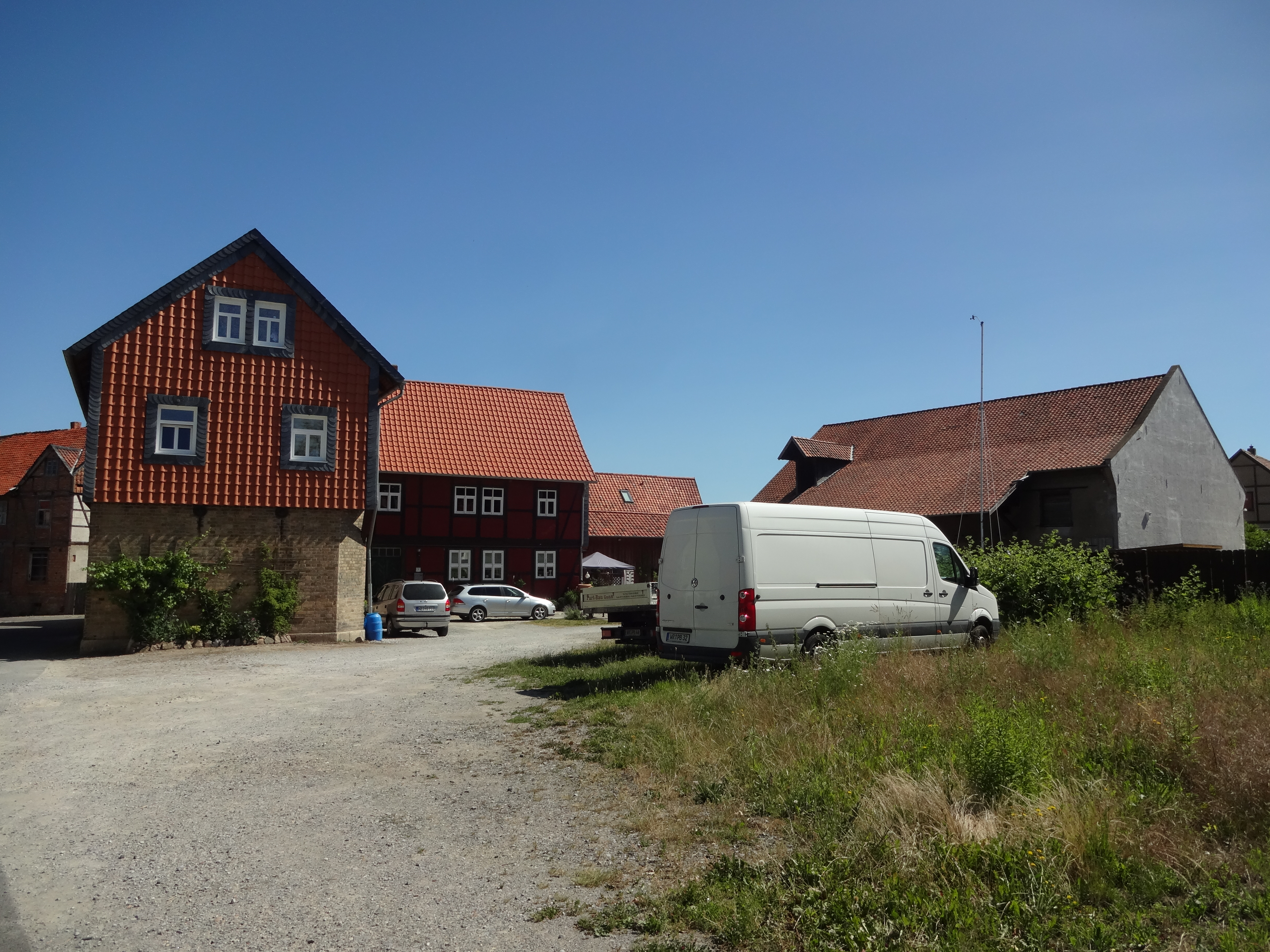 denkmalgeschützter Bauernhof in der Poststraße 7 in Langeln, Gemeinde Nordharz